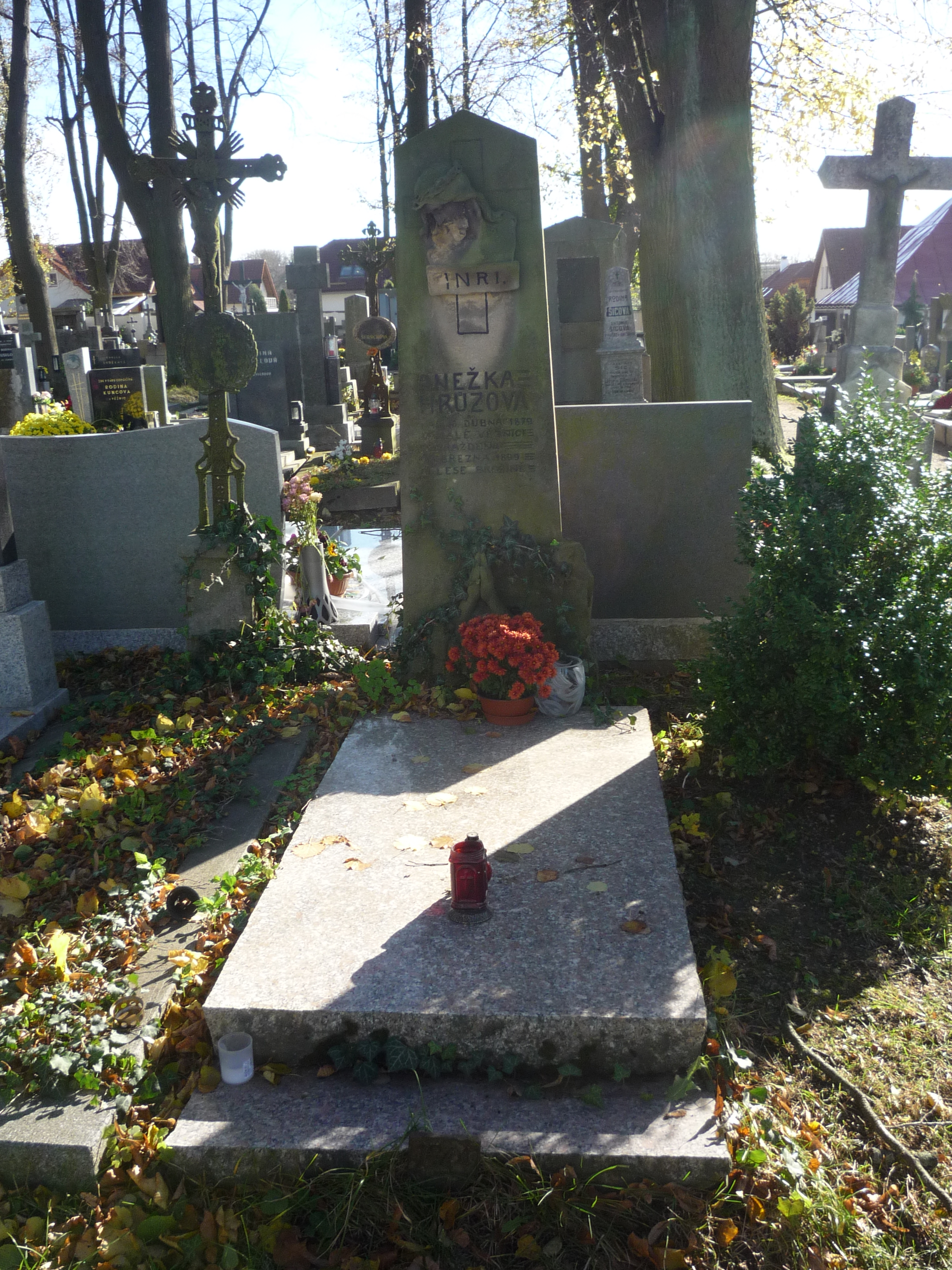 Autor fotogrfie Jiří Zelenka. Pomník Anežky Hrůzové. Hřbotov u kostela sv. Barbory. Polná. Okr.Jihlava. Kraj Vysočina. Czech Republic.